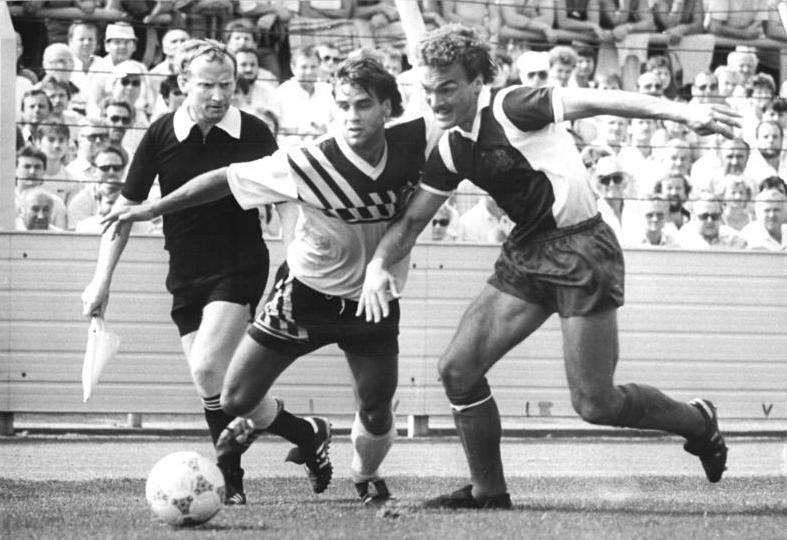 ADN-ZB-Häßler -19.8.89-mx- Bischofswerda: 2. Spieltag der Fußball-Oberliga- Fortschritt Bischofswerda - Dynamo Dresden 0:1 (0:0)- Meister Dynamo Dresden kam im Bezirks-Duell mit Aufsteiger Fortschritt Bischofswerda vor ausverkauftem Haus zum zweiten Mal in dieser Saison ohne Gegner zum Erfolg. Hier der Dresdner Ulf Kirsten (l.) und Steffen Schmidt von den Gastgebern im Zweikampf.